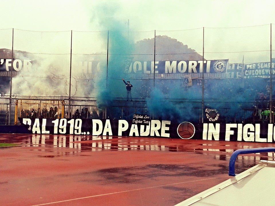 Curva Sud "Catello Mari" durante il match Cavese-Battipagliese